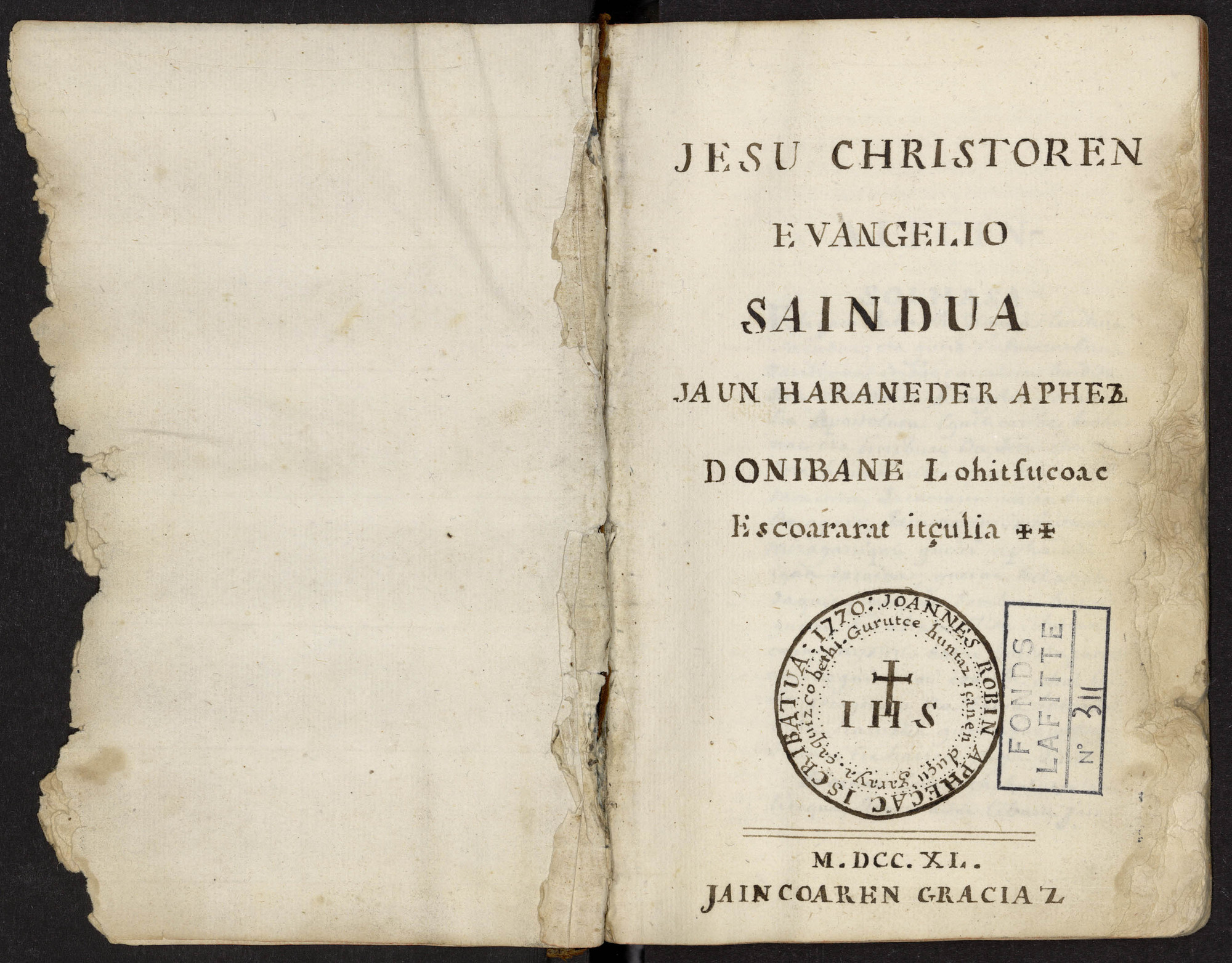 Haranederren Testamentu berriaren 1750eko itzulpena (eskuizkribua)